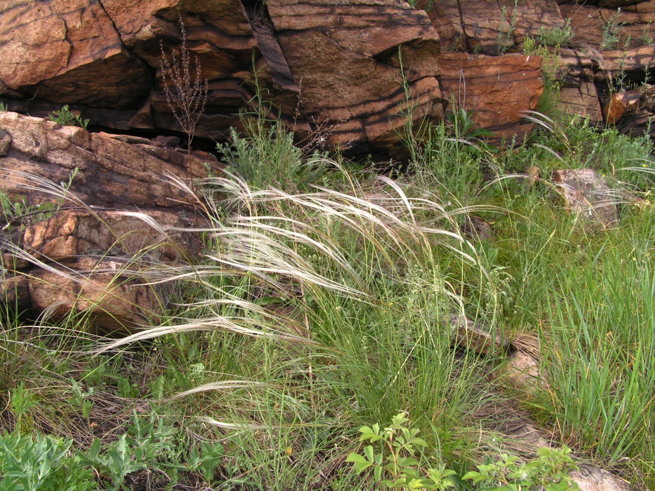 Мар'їн стрімчак, м. Брянка в районі сел. Старої Замківки